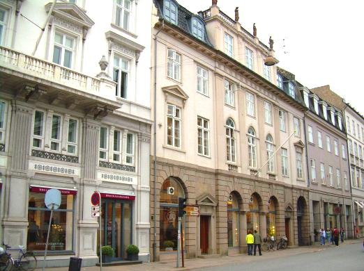 Bredgade anno 2007 - blik mod en af gadens mange kunsthandlere - foto taget den 2. september 2007 - af M. Utzon